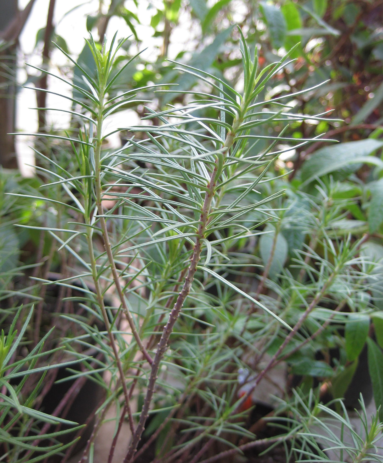 Asclepias linaria im Botanischen Garten Dresden